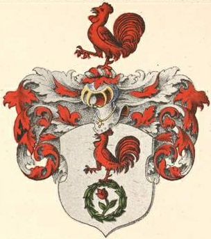 Hahni suguvõsa aadlivapp